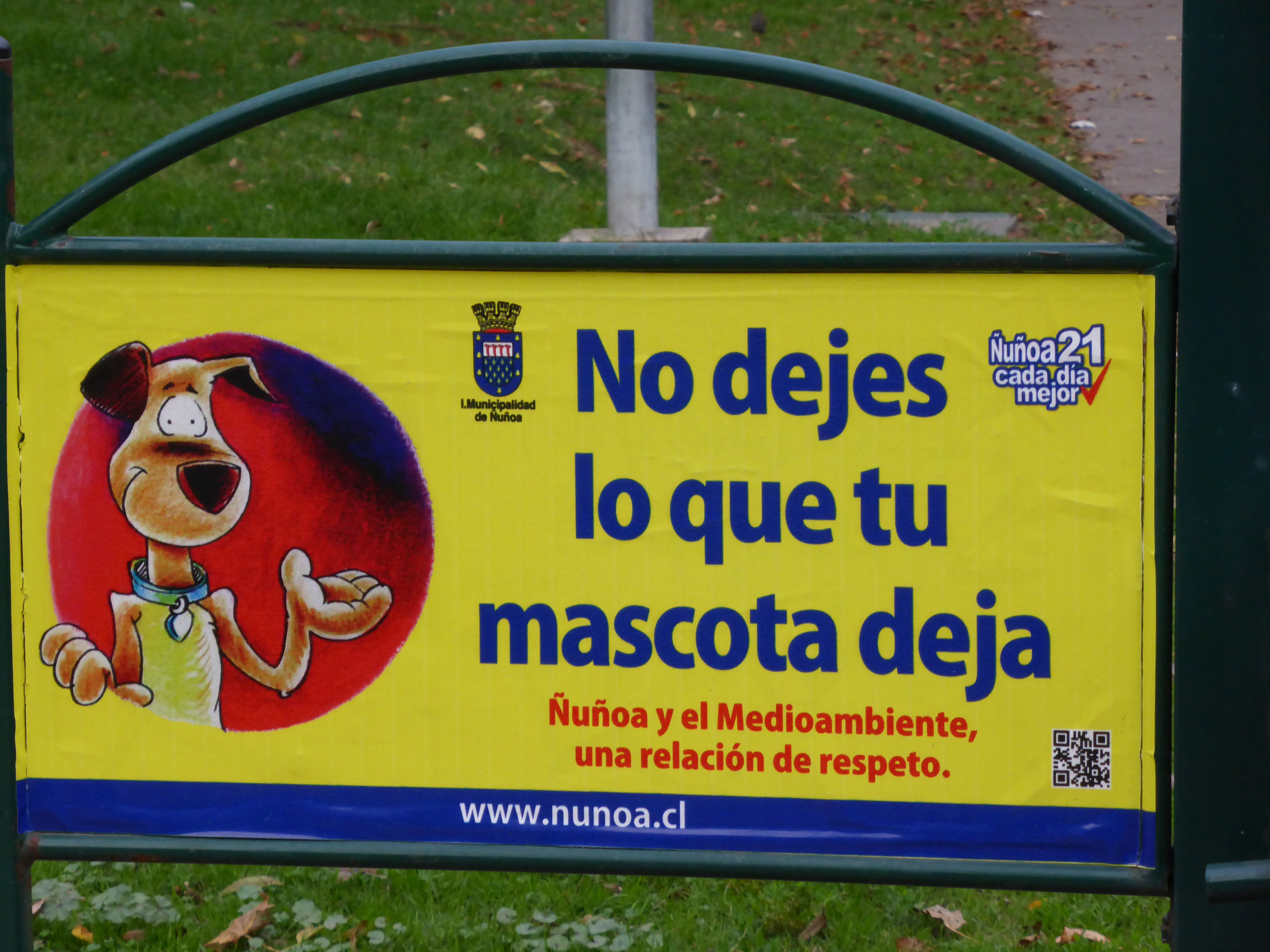 Cartel de la Municipalidad de Ñuñoa, para no dejar las fecas de mascotas.